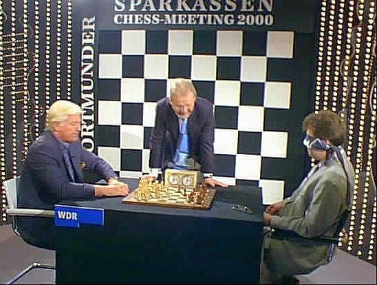 Dr. Claus Spahn (WDR-Fernsehen) gegen GM Klaus Bischoff, der blind spielt und nur drei Minuten Zeit hat. Helmut Pfleger führt für ihn die Züge aus (Dortmunder Schachtage 2000 im Fernsehen).